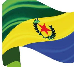 Bandeira do município de Cidade Ocidental, Goiás, Brasil.